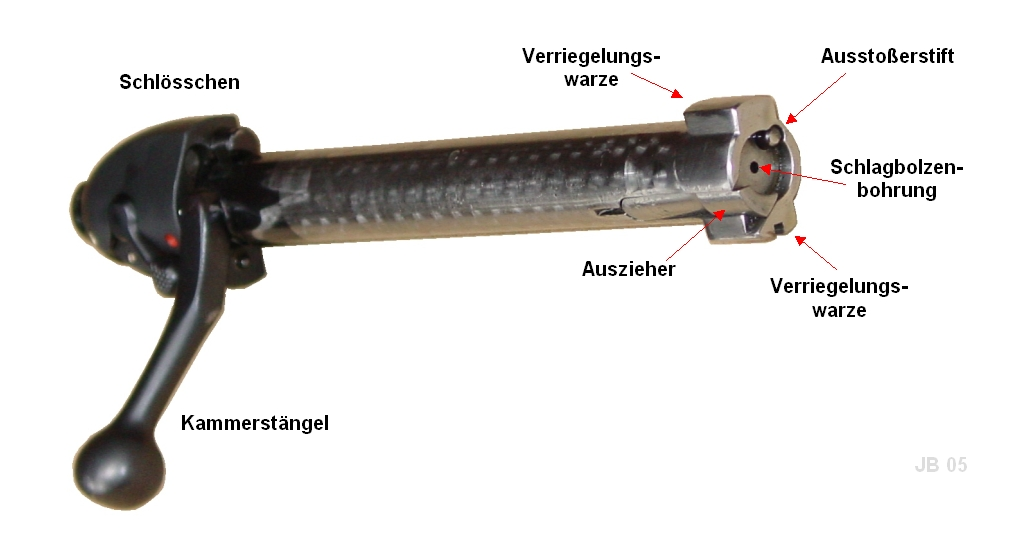 Zylinderverschluss eines Repetiergewehrs mit Bezeichnungen Grafik Joachim Bäcker 2005/09/27